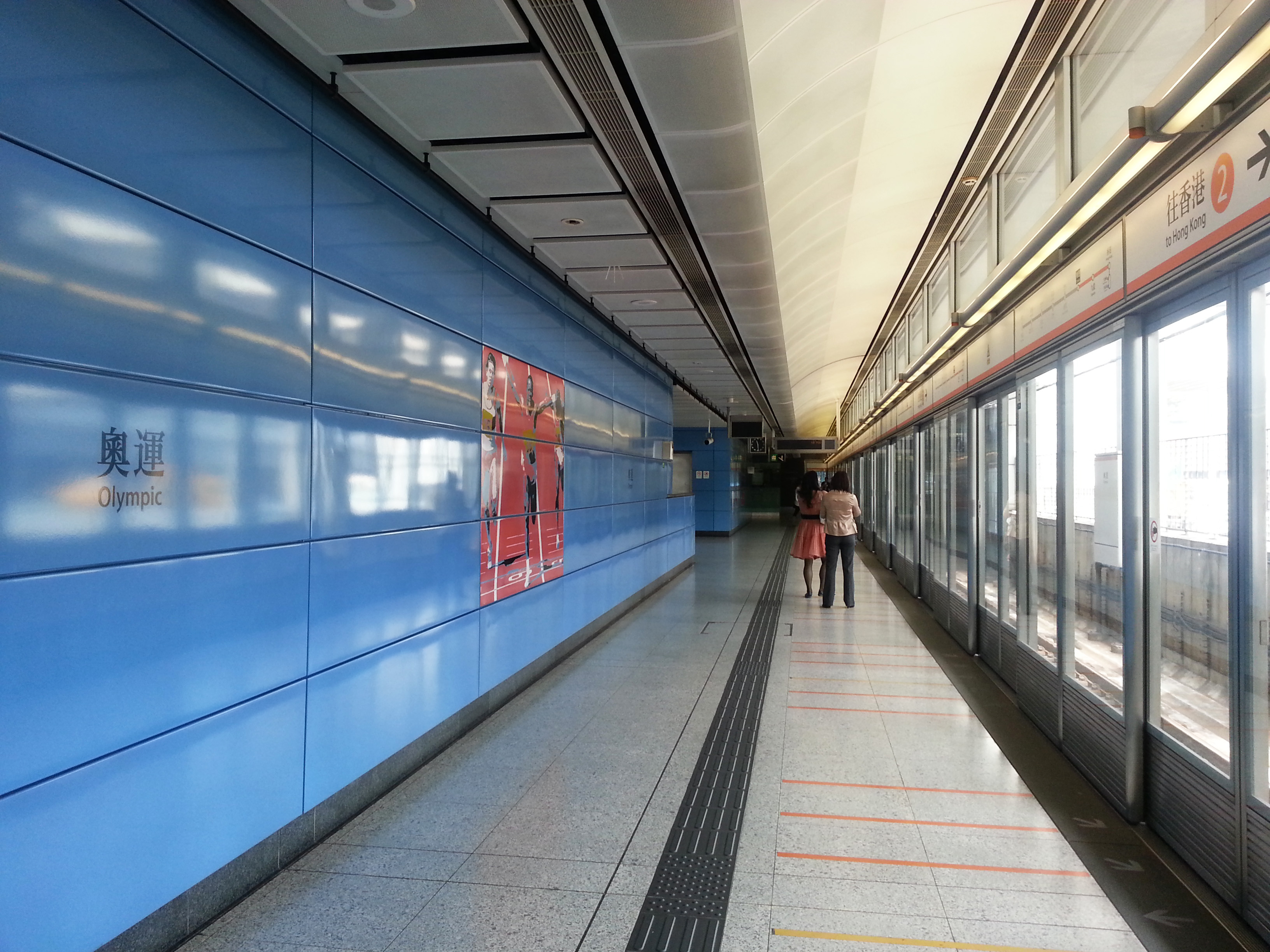 港鐵奧運站月台